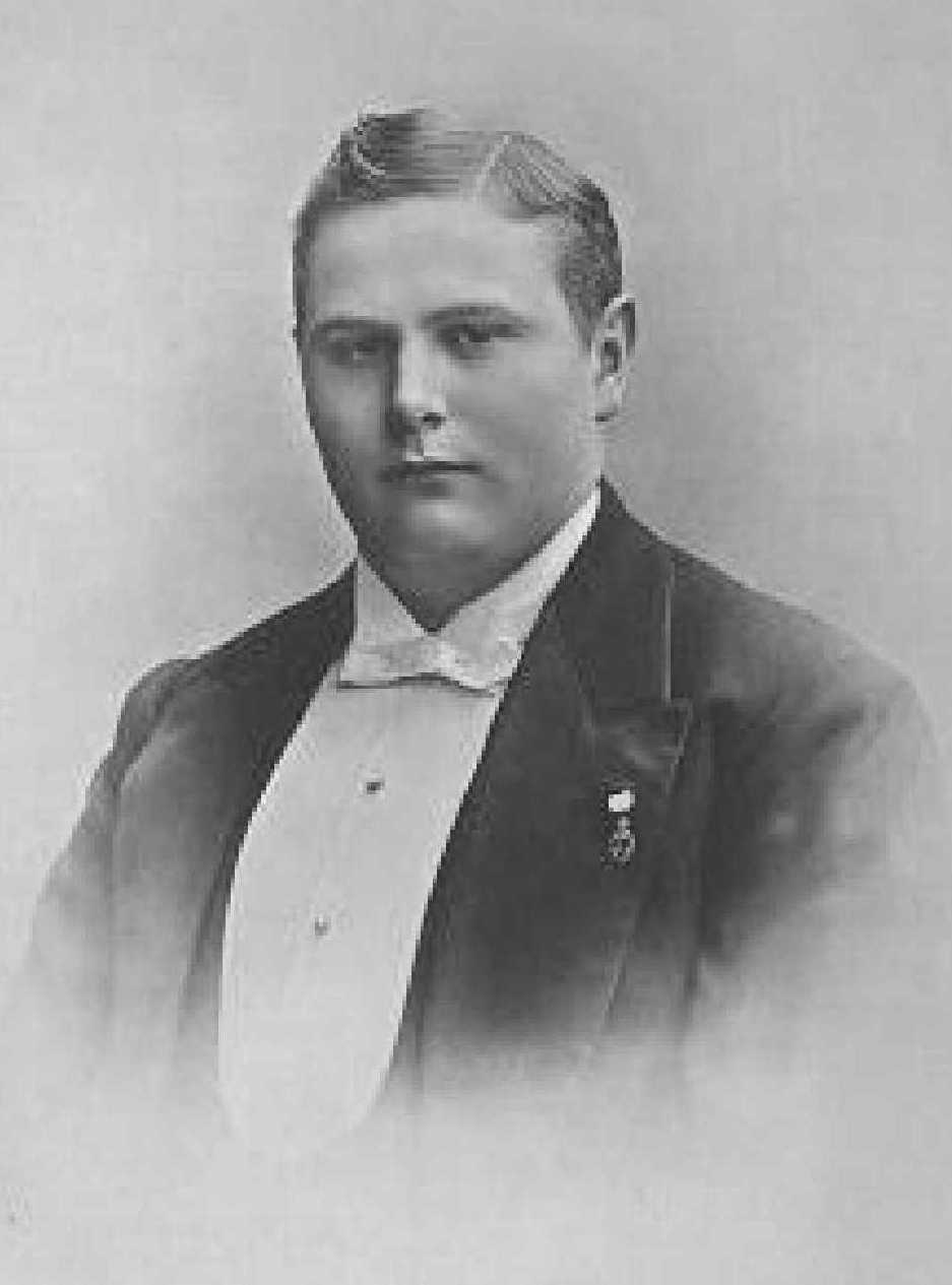 Prinz Gustav von Dänemark (1887-1944)